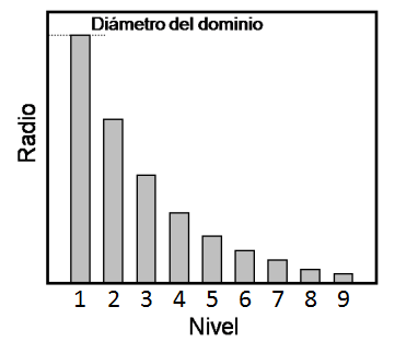 Evolución del radio de las especies generadas por UEGO según el nivel de búsqueda.